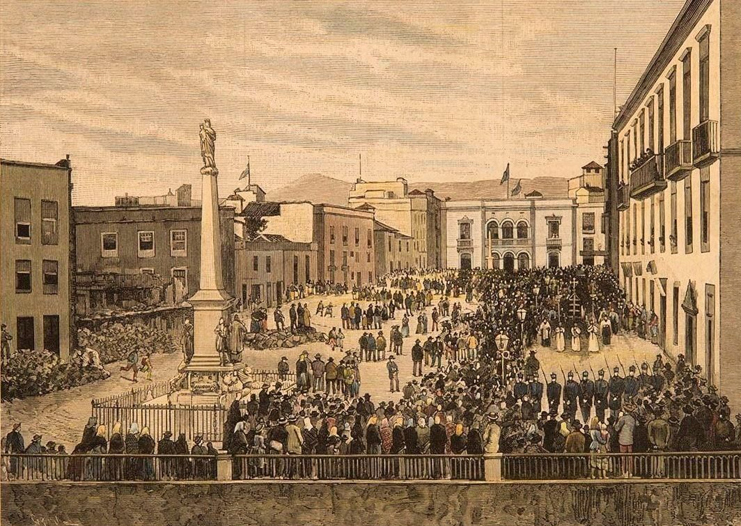 Santa Cruz de Tenerife (Canarias).- Los funerales del vicealmirante chileno Excmo. Sr. D. Patricio Lynch: paso del cortejo fúnebre por la Plaza de la Constitución.- Grabado a partir de la fotografía de Joaquín Martí, remitida por el Sr. Rodriguez y Núñez.